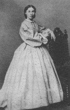 Екатерина Калита-Майкова - жена писателя Владимира Николаевича Майкова, возможный прототип Веры из романа Гончарова "Обрыв"